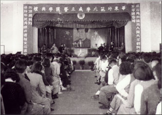 中文（中国大陆）: 华东师范大学成立暨开学典礼